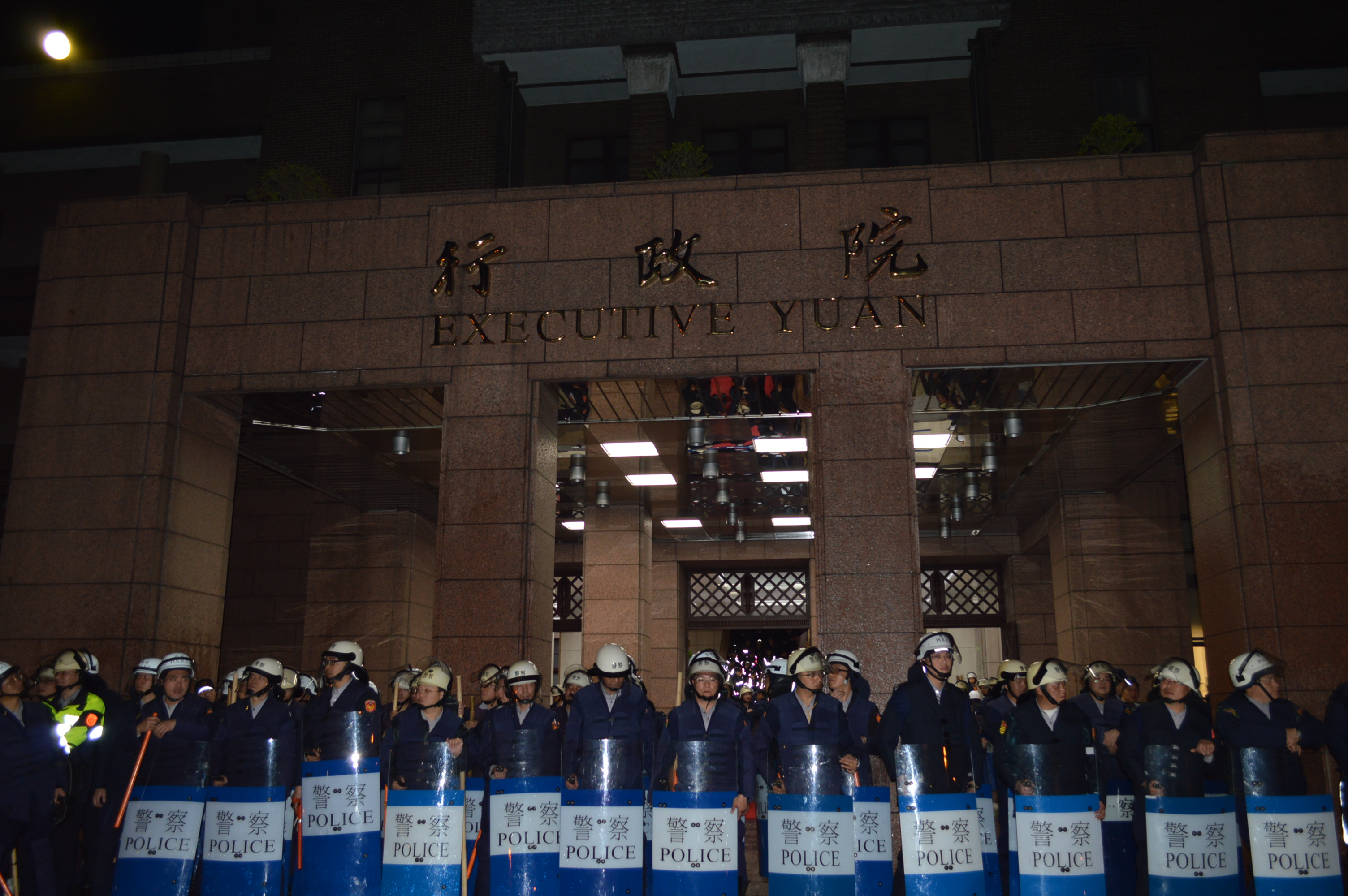 收復行政院。